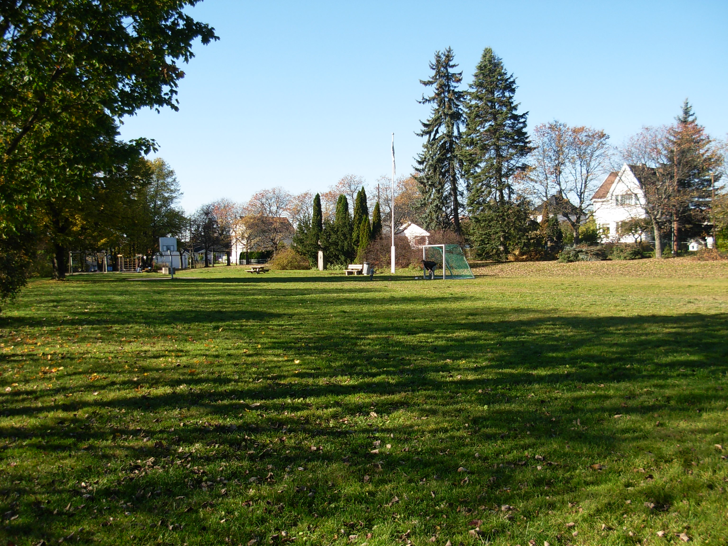 Sverre Refstads plass, Risløkka, Oslo